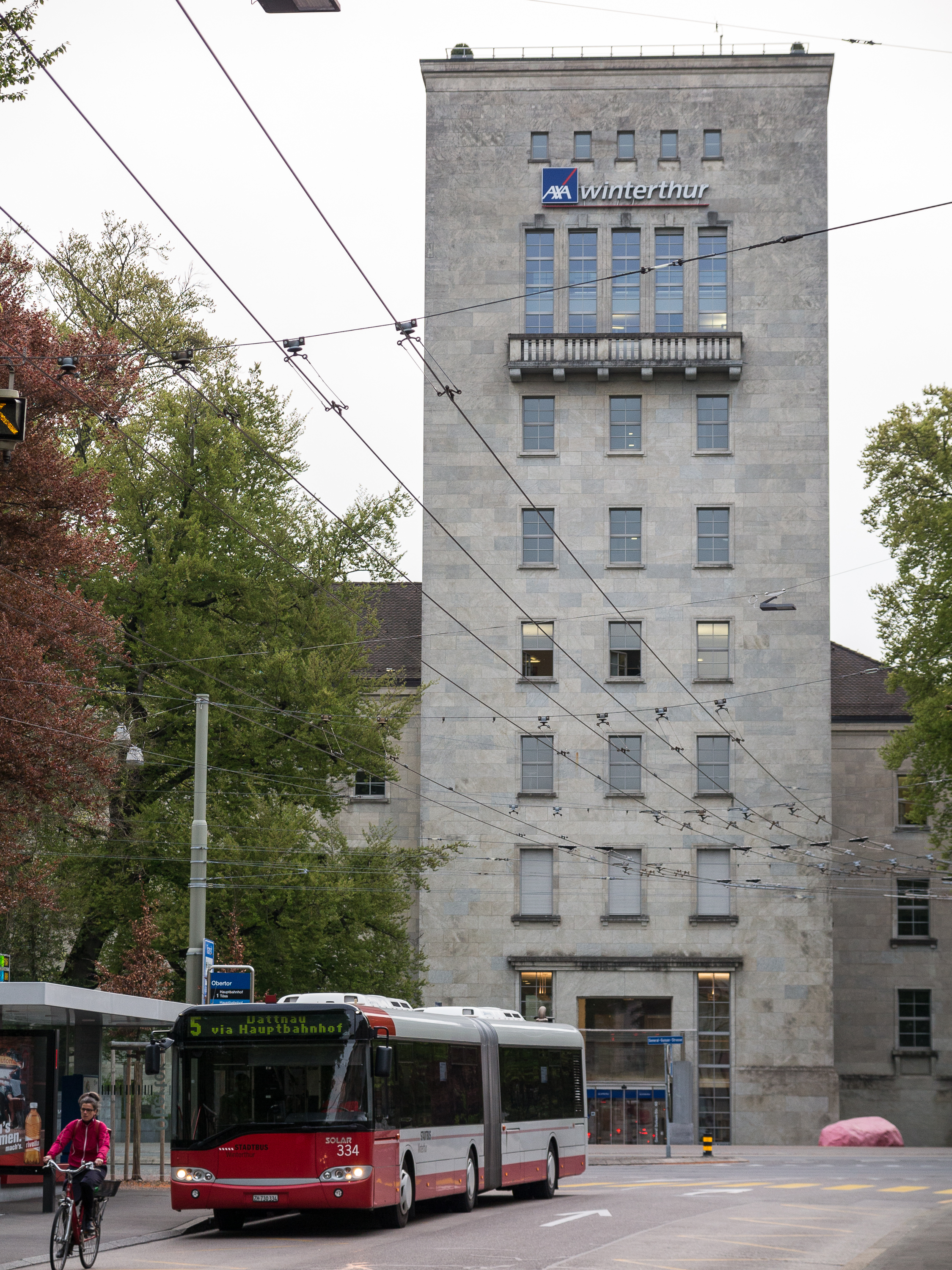 Der markante Turm der Verwaltungsgebäude der AXA Winterthur wurde 1929/31 errichtet und gilt als Vorbild späterer Hochhäuser in der Schweiz.